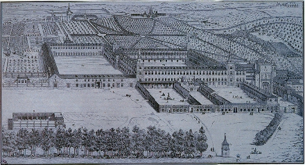 El Palacio del Buen Retiro en 1636-1637, dibujo del siglo XVII.